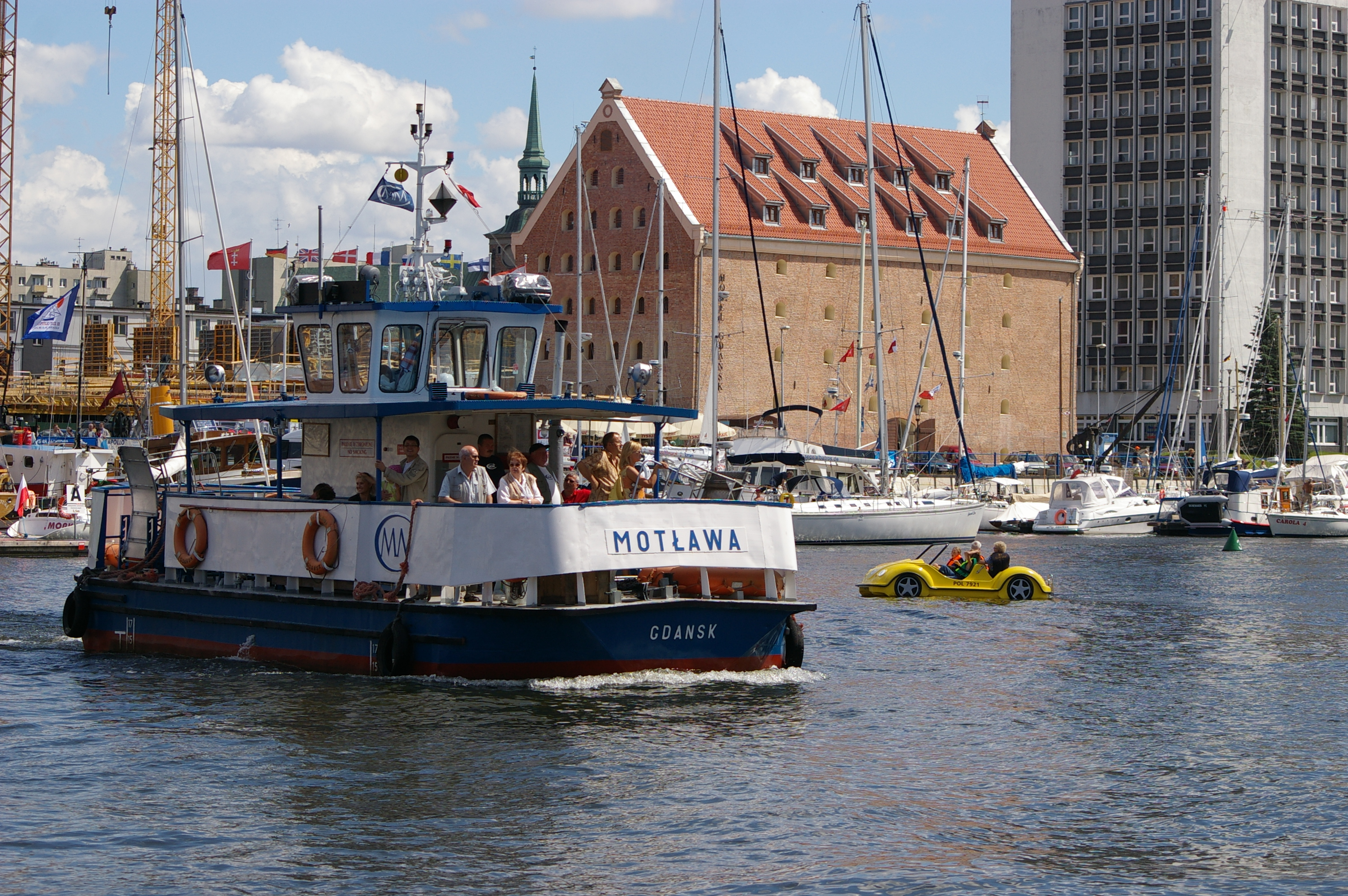 Rower wodny na Motławie spotyka się z promem